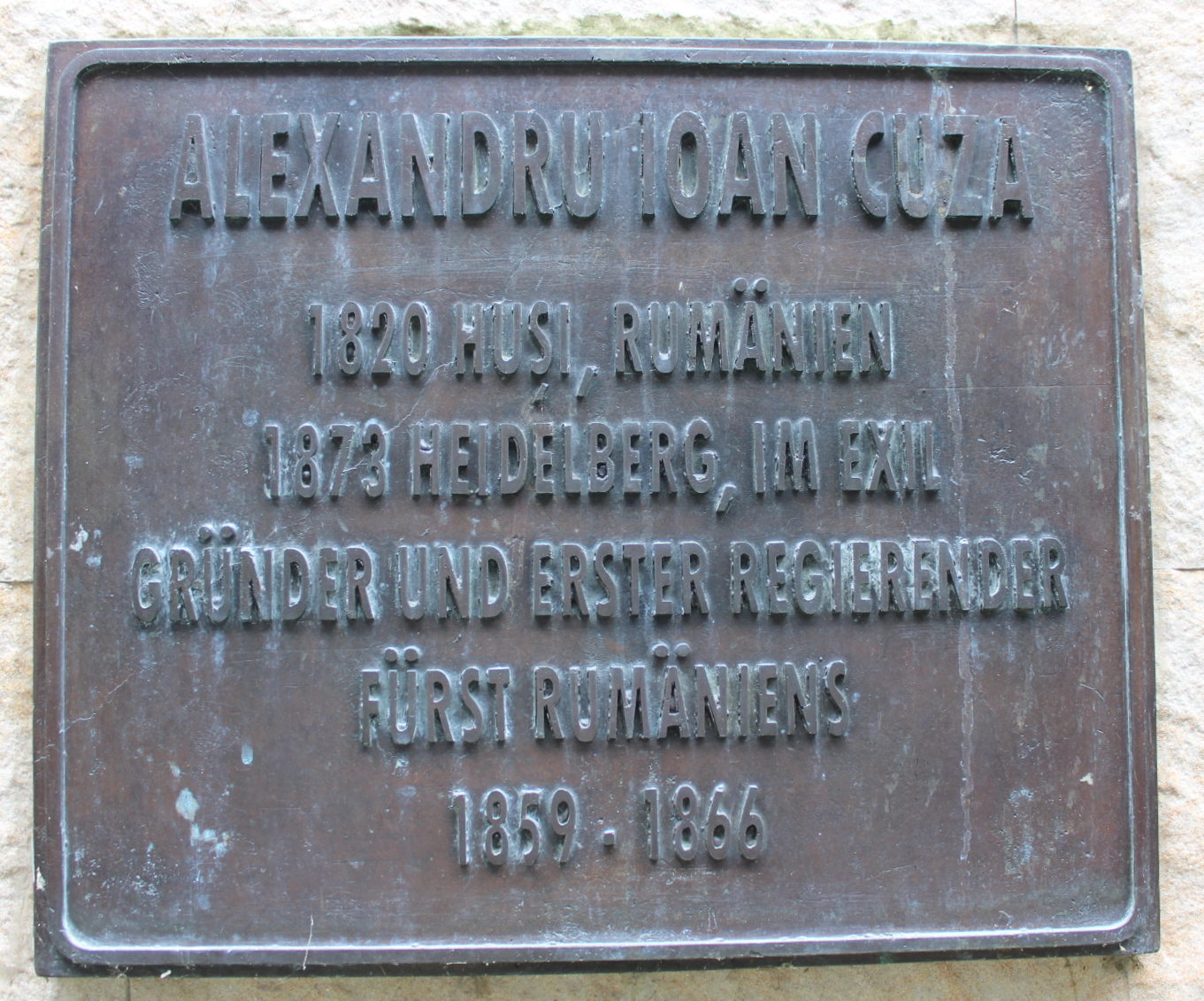 Das ist eine Plakette